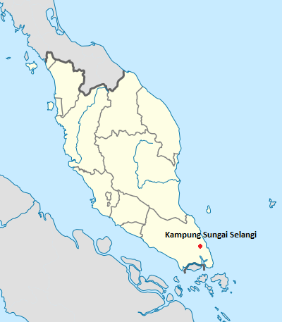 Kampung Sungai Selangi Location Map